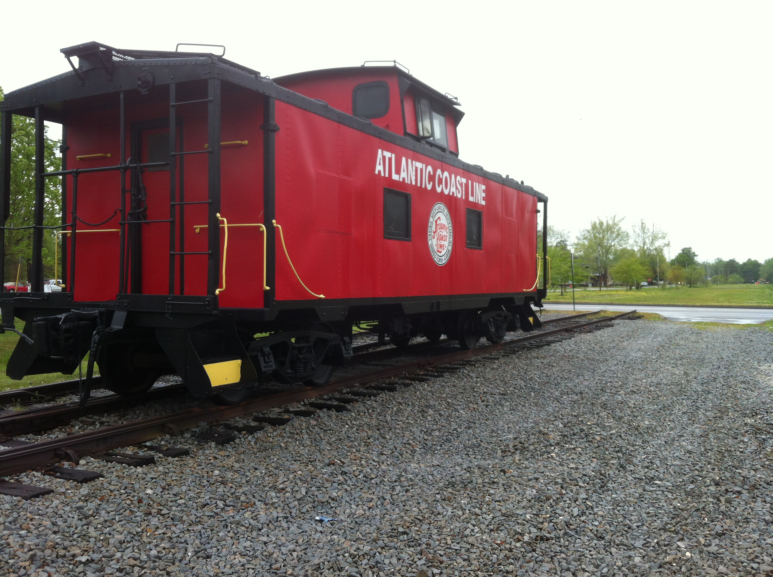 Burgaw, NC 28425, USA